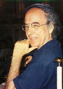 Foto del Prof. Nico Perrone, scattata da me.